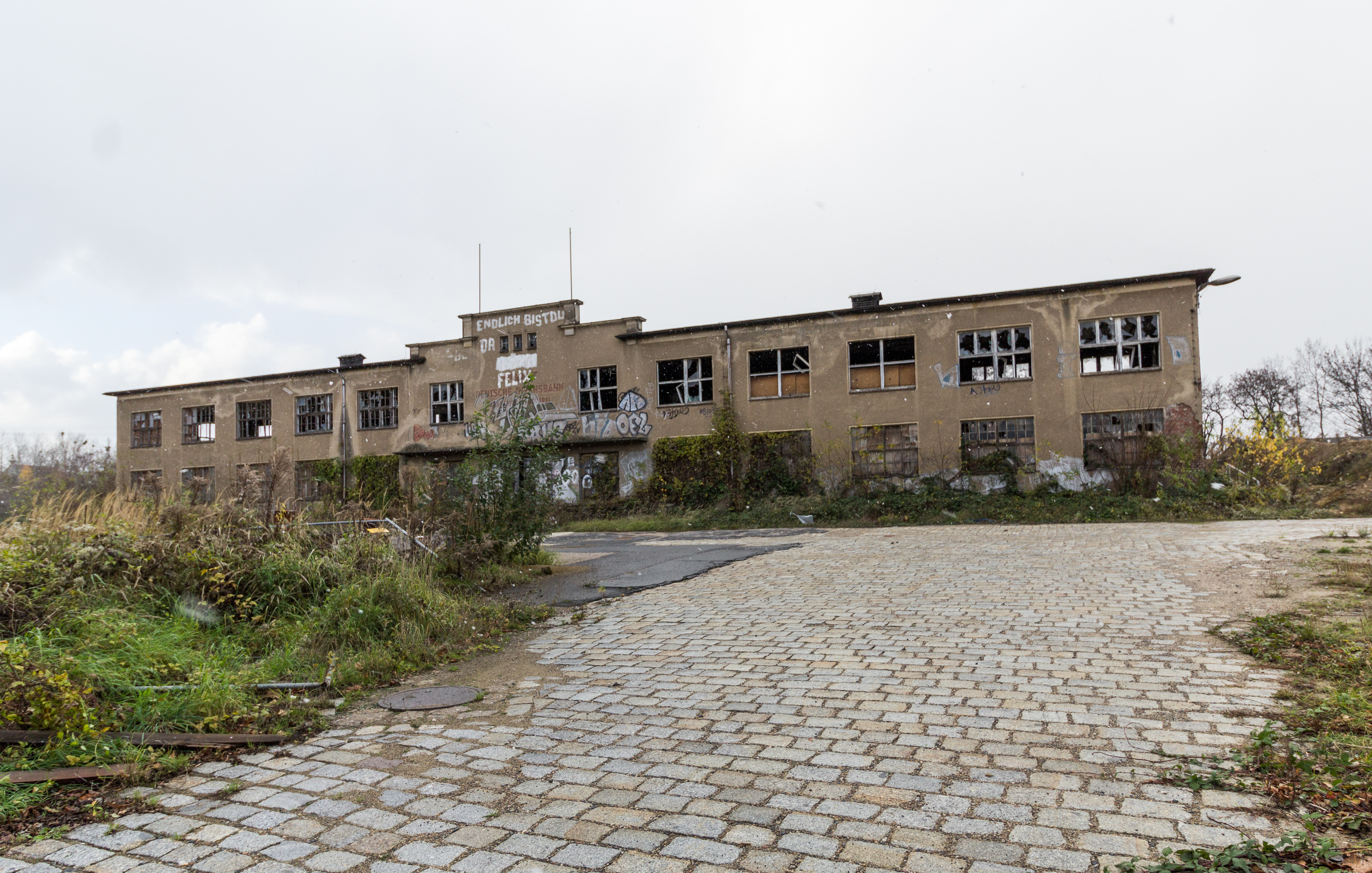 Fabrikhalle Freiberger Straße 32, Dresden; Reste des Kohlebahnhofs an der Albertbahn. Am Schriftzug "Deutsche Reichsbahn" noch zu erkennen. Etwas undeutlicher zu sehen darunter: "Fahrkarten Druckerrei" darunter "1951"